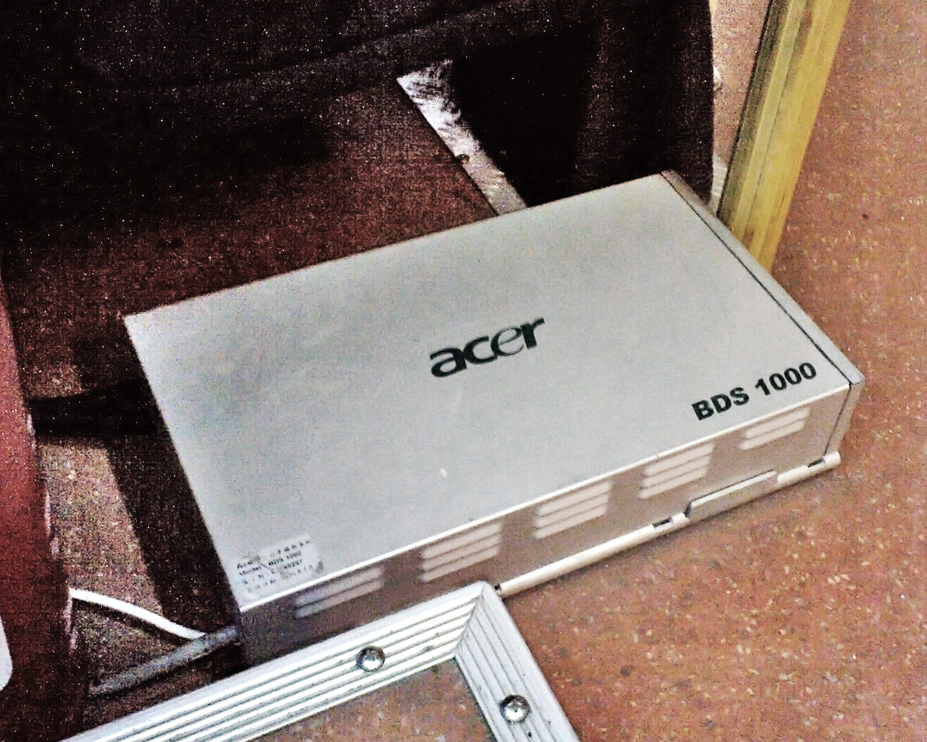 中文（台灣）: 台北聯營公車駕駛座後方安裝的宏碁BDS1000電視盒。